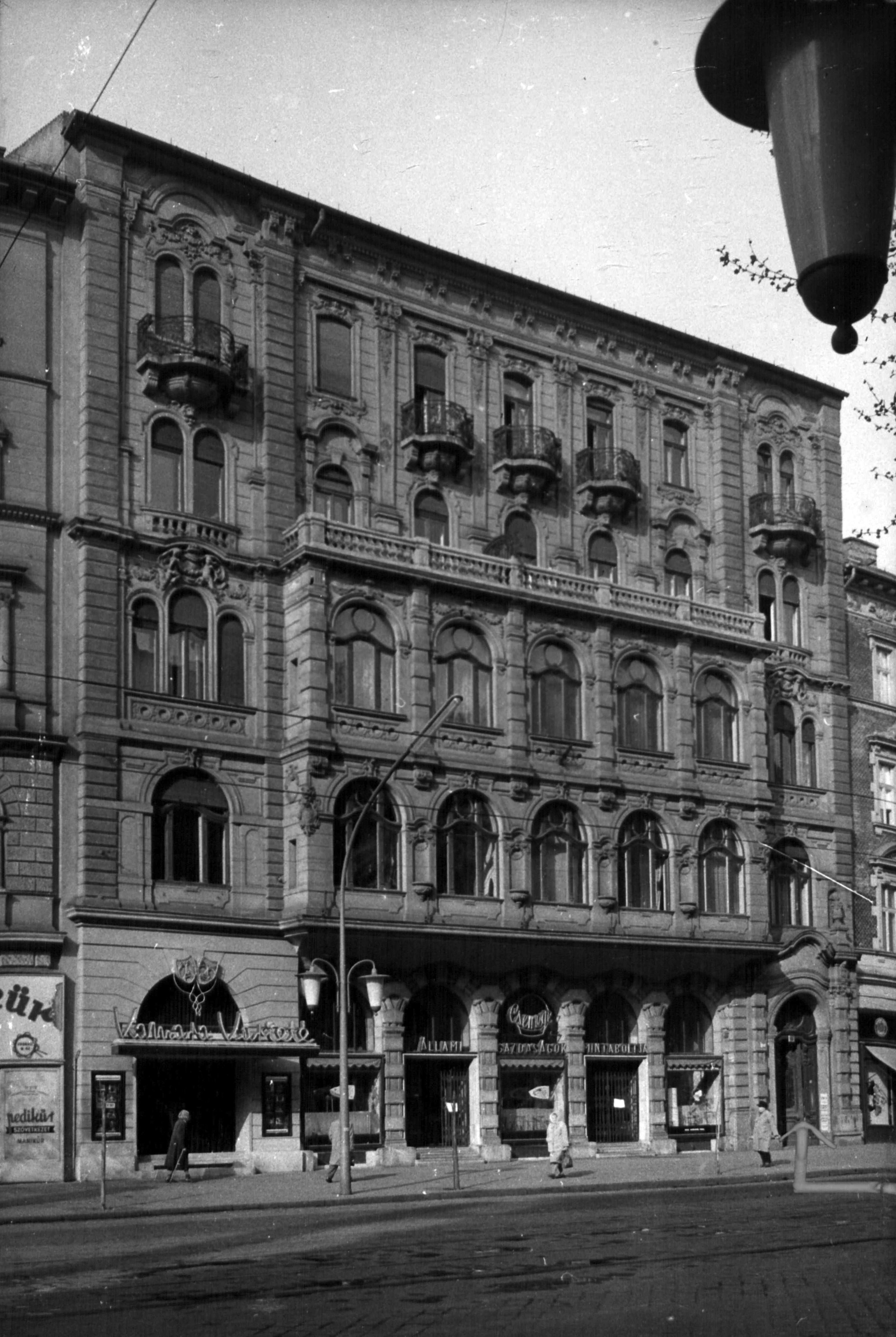 Teréz körút 48. (Lenin körút 106.). Kamara Varieté (ma Játékszín). A kép forrását kérjük így adja meg: Fortepan / Budapest Főváros Levéltára. Levéltári jelzet: HU_BFL_XV_19_c_11 Location: Hungary, Budapest VI. Tags: Budapest Title: Teréz körút 48. (Lenin körút 106.). Kamara Varieté (ma Játékszín). A kép forrását kérjük így adja meg: Fortepan / Budapest Főváros Levéltára. Levéltári jelzet: HU_BFL_XV_19_c_11